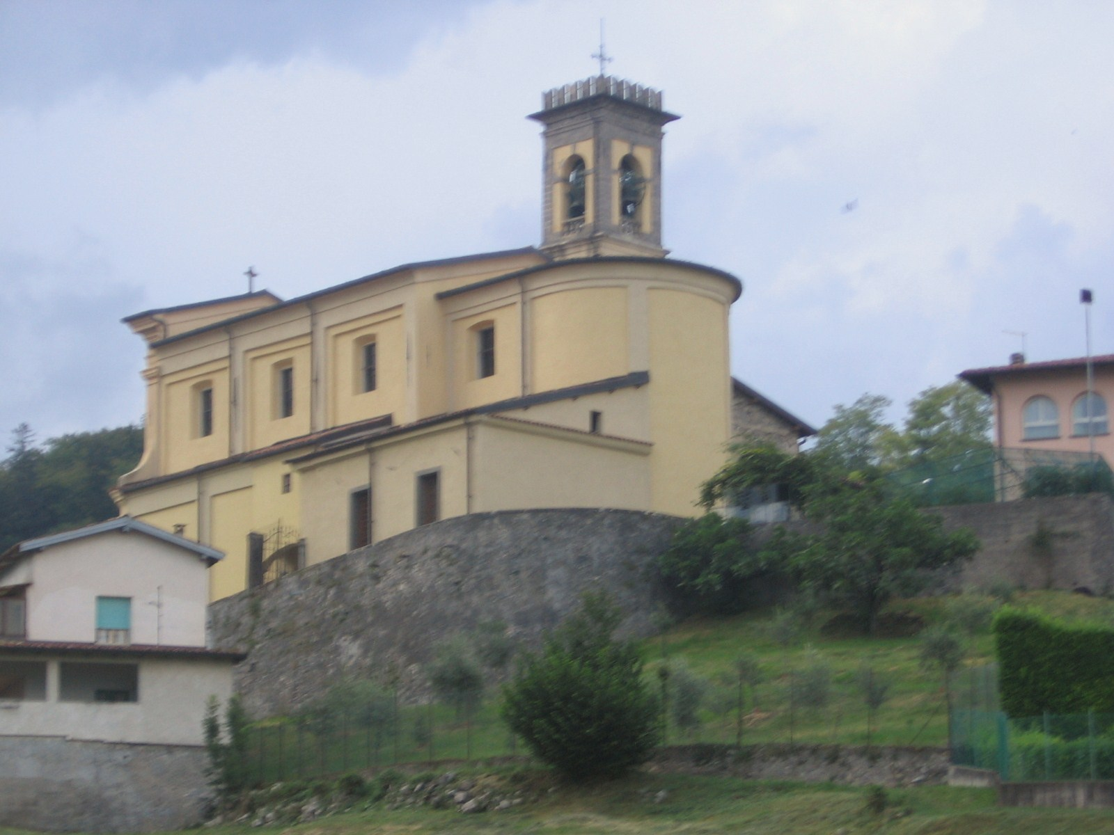 Solto Collina, Bergamo, Italia